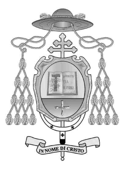 stemma di s.e. mons. benigno luigi papa